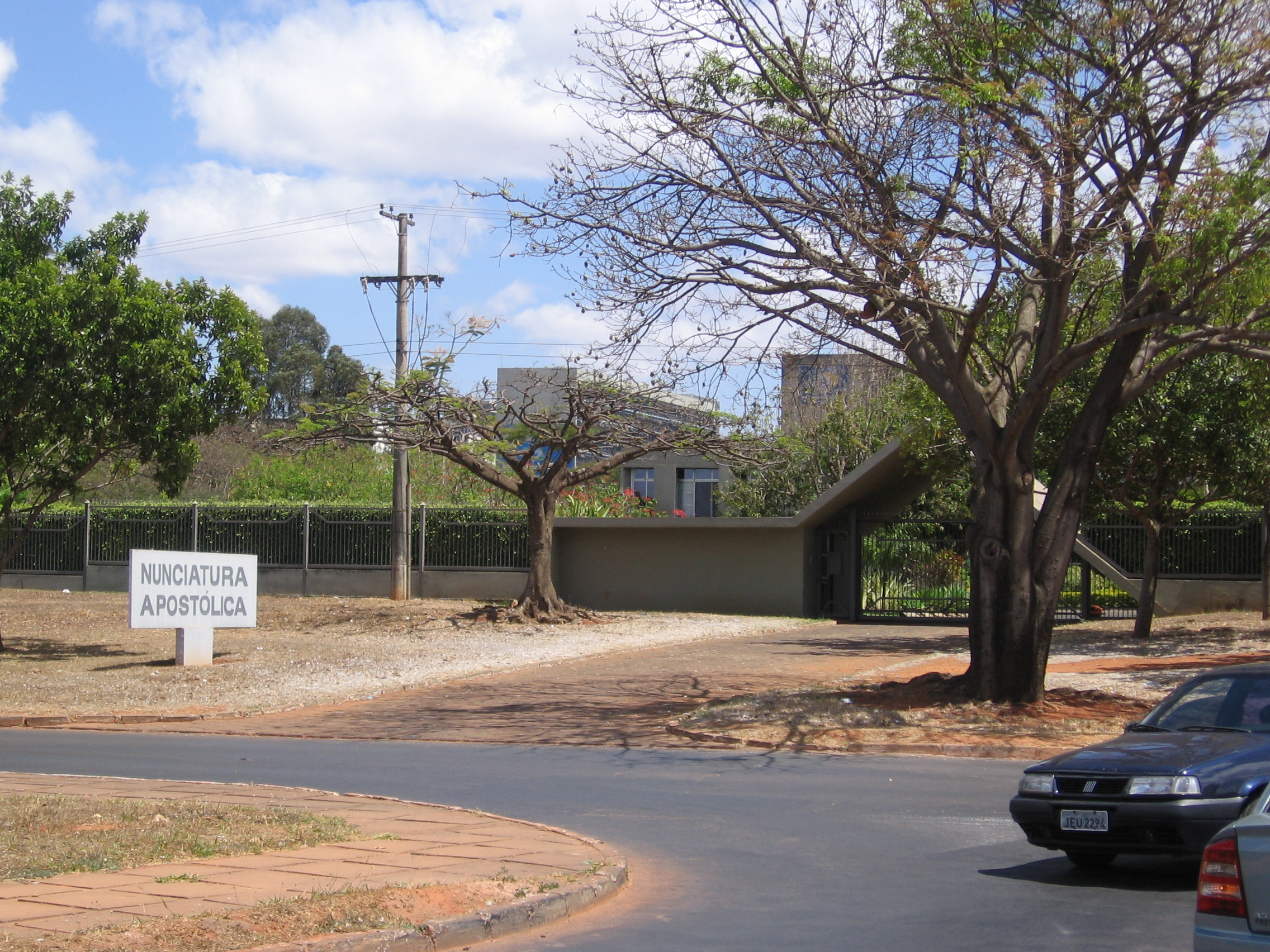 Apostolic Nunciature in Brasilia, Brazil